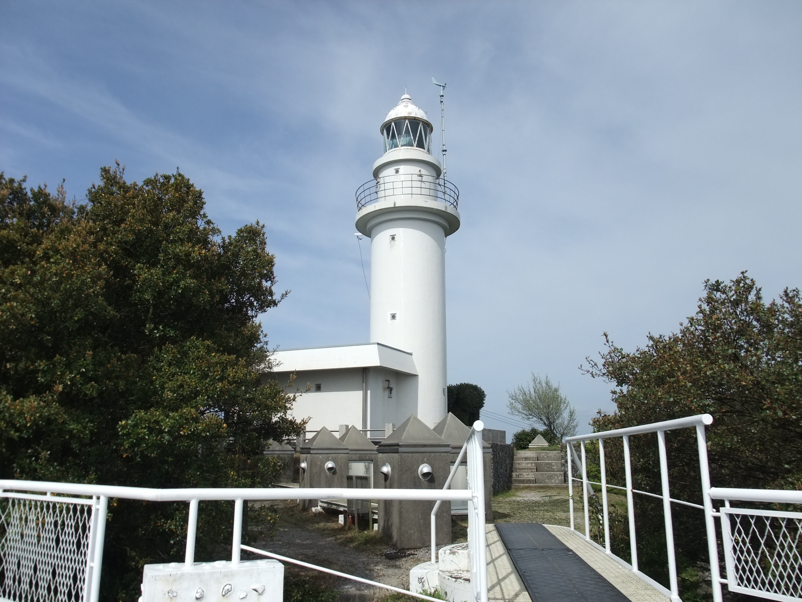 鶴御埼灯台